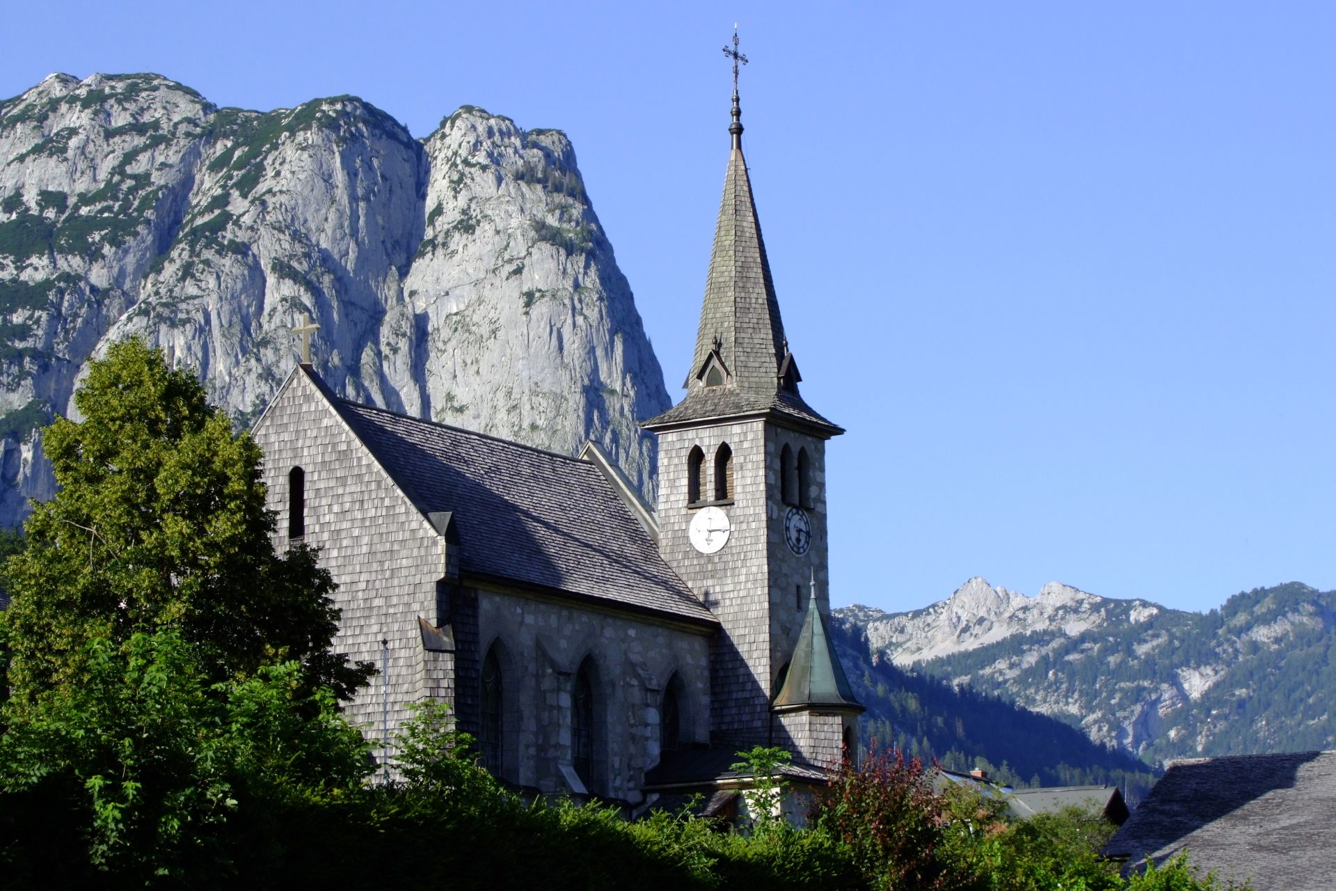 Kath. Pfarrkirche Herz Jesu